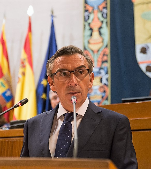 Luis María Beamonte